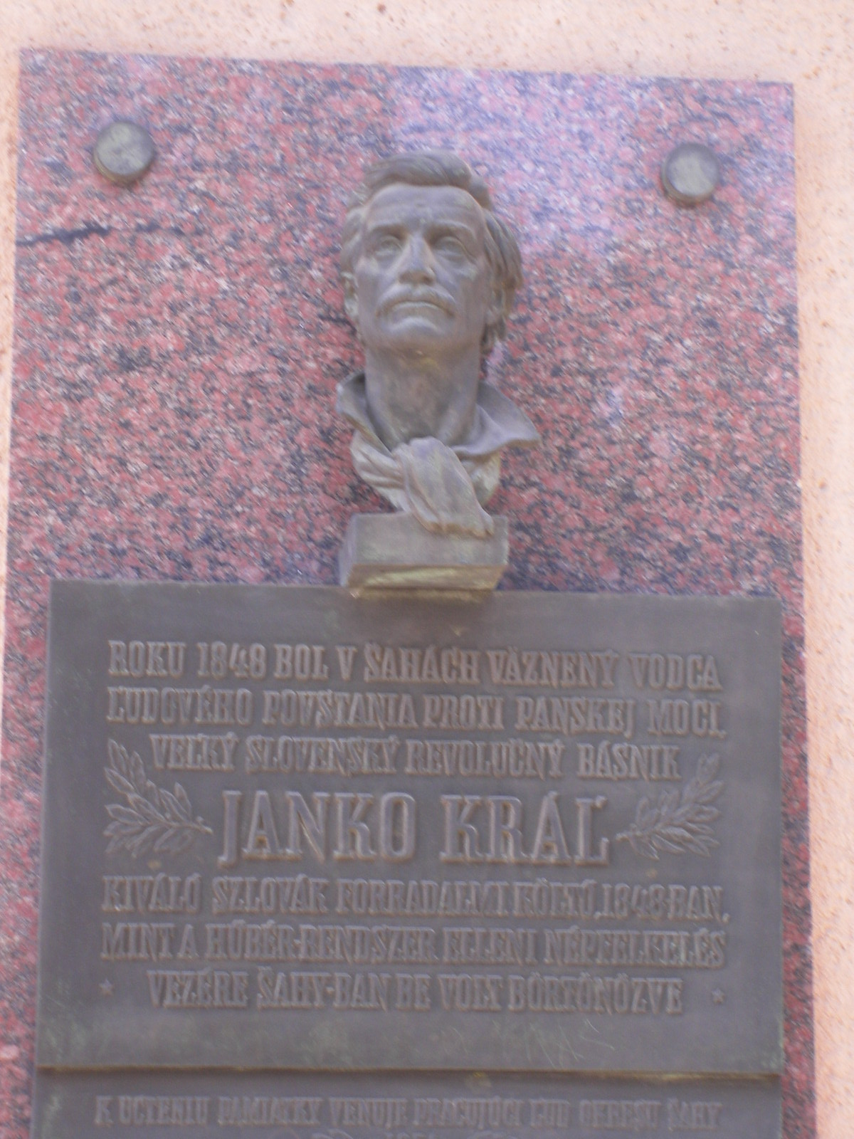 Ipolyság - Janko Kráľ emléktáblája a városháza falán